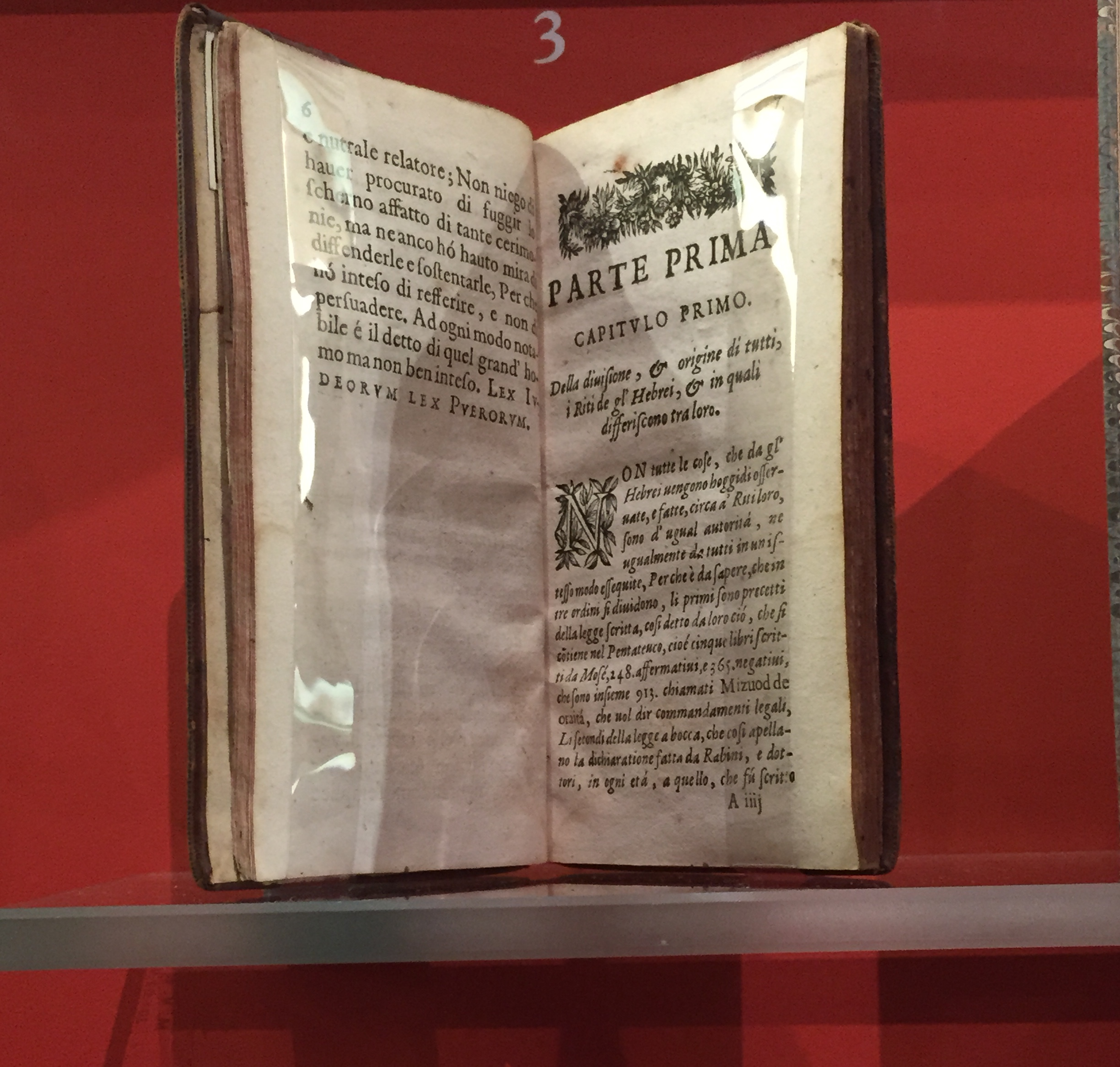 Historia degli riti hebraici - Paris 1637 - bibliothèque de l'AIU